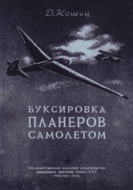 Обложка книги изданной в 1936 году и хранящейся в Российской государственной библиотеке. Автор книги Д. А. Кошиц - советский лётчик-испытатель и планерист-рекордсмен.